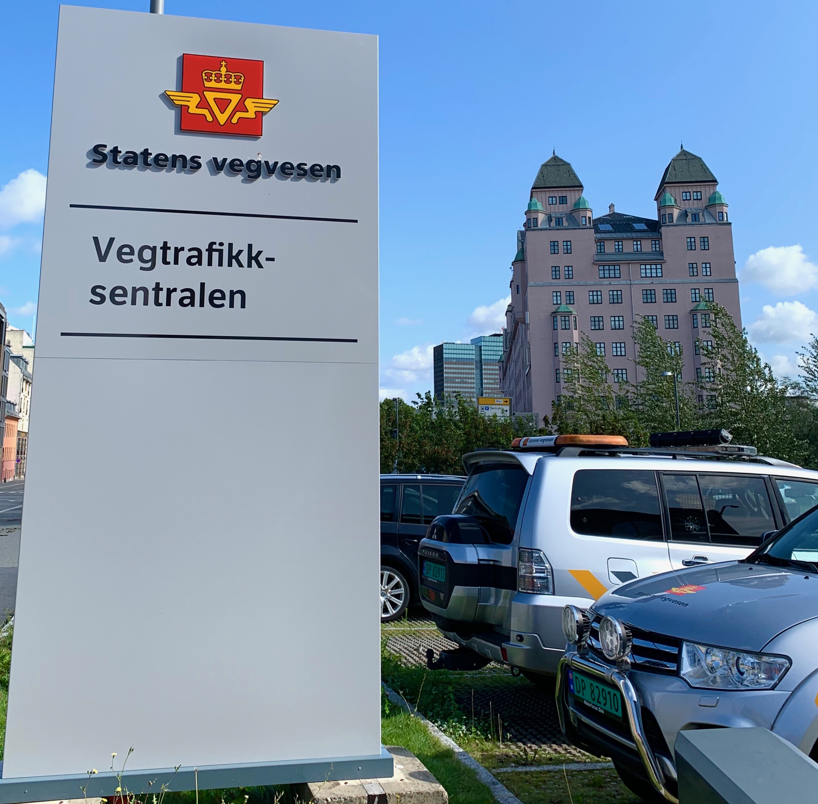 Skilt for Vegtrafikksentralen (VTS) Oslo, Statens vegvesen